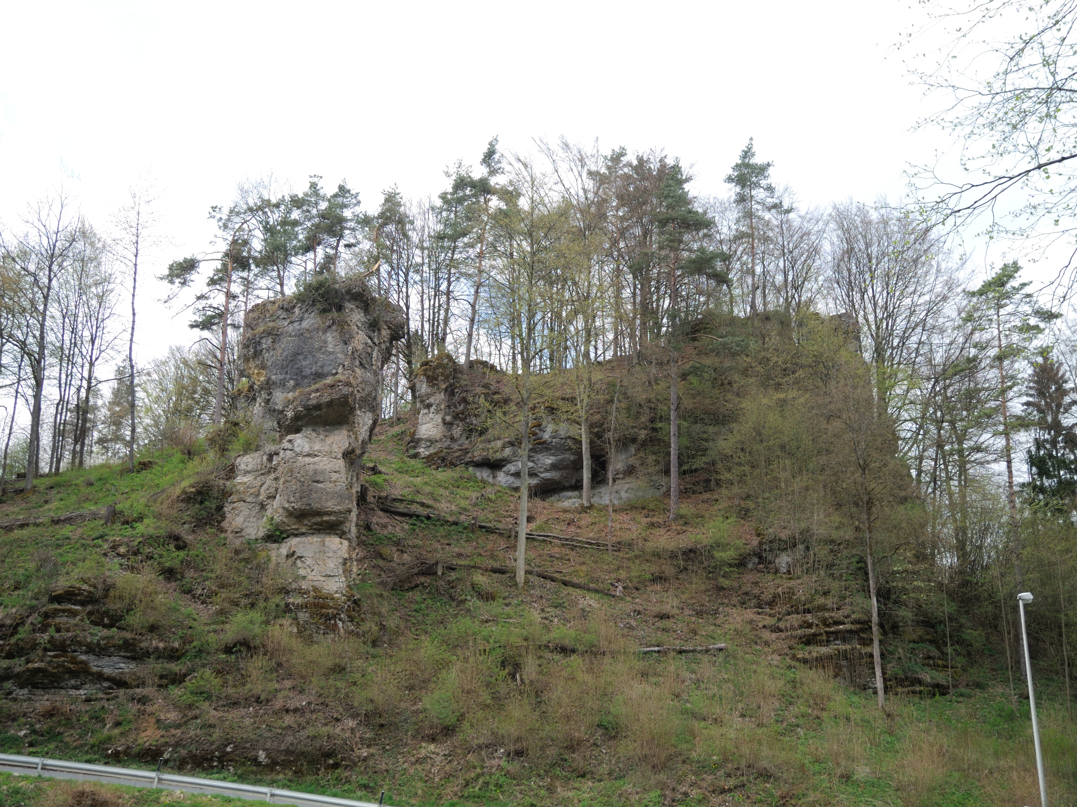 Burgstall Burgstuhl - Ansicht aus südöstlicher Richtung